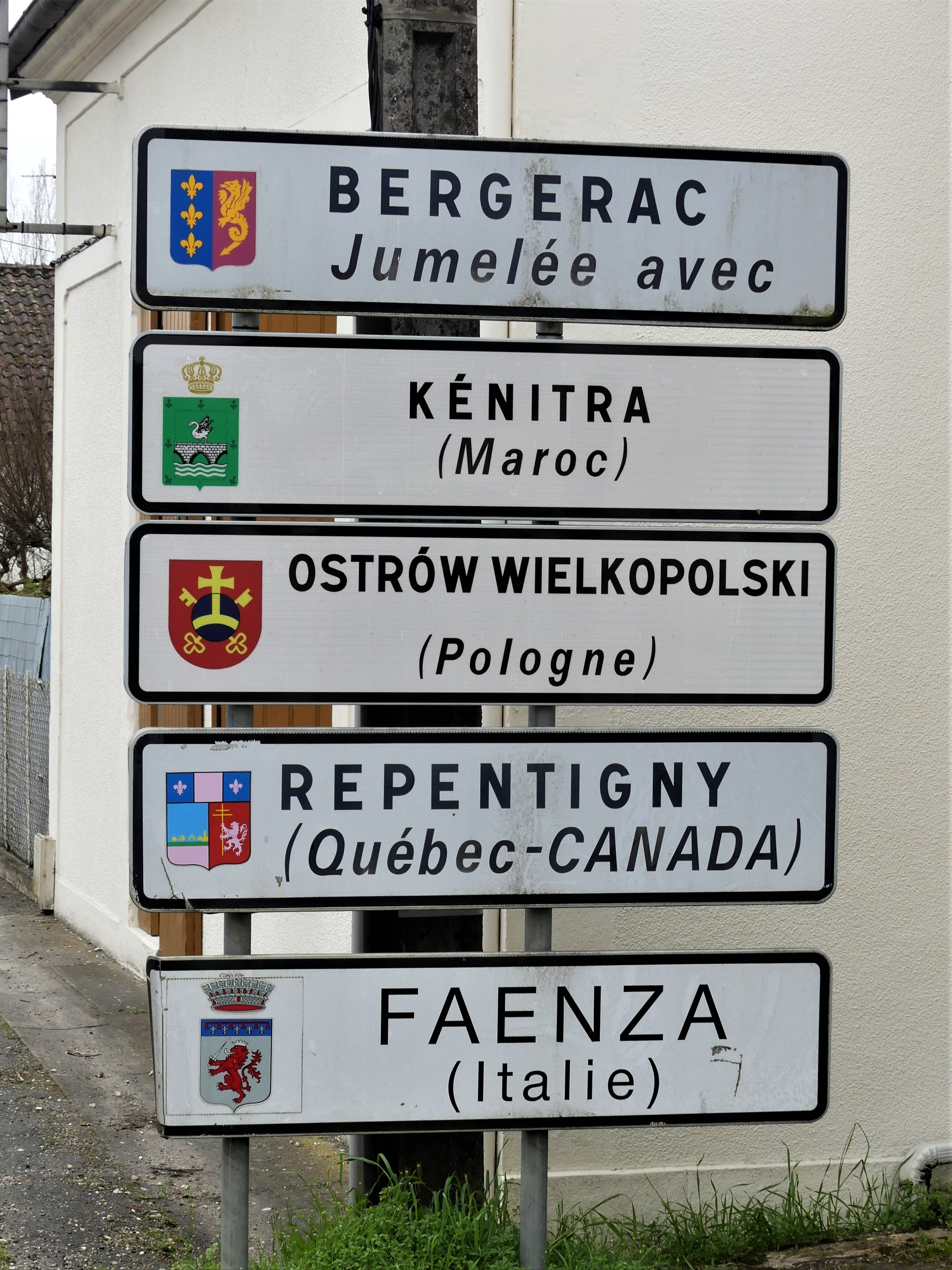 Panneau des jumelages de Bergerac, Dordogne, France.